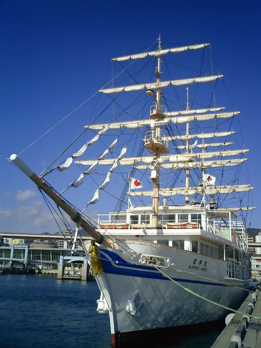 Nihonmaru_replica